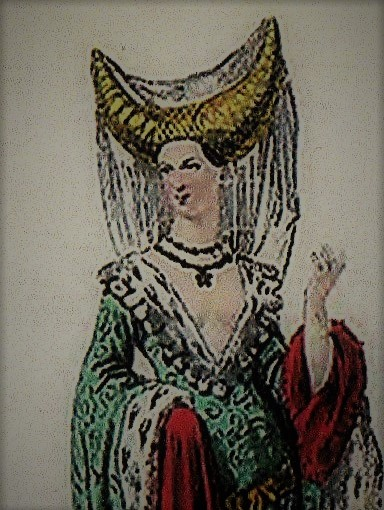 ritratto di Agnese di Massa, giudicessa consorte di Torres e reggente del giudicato di Cagliari (1195-1257 circa), madre della regina Adelasia di Torres che sposò il re Enzo di Svevia